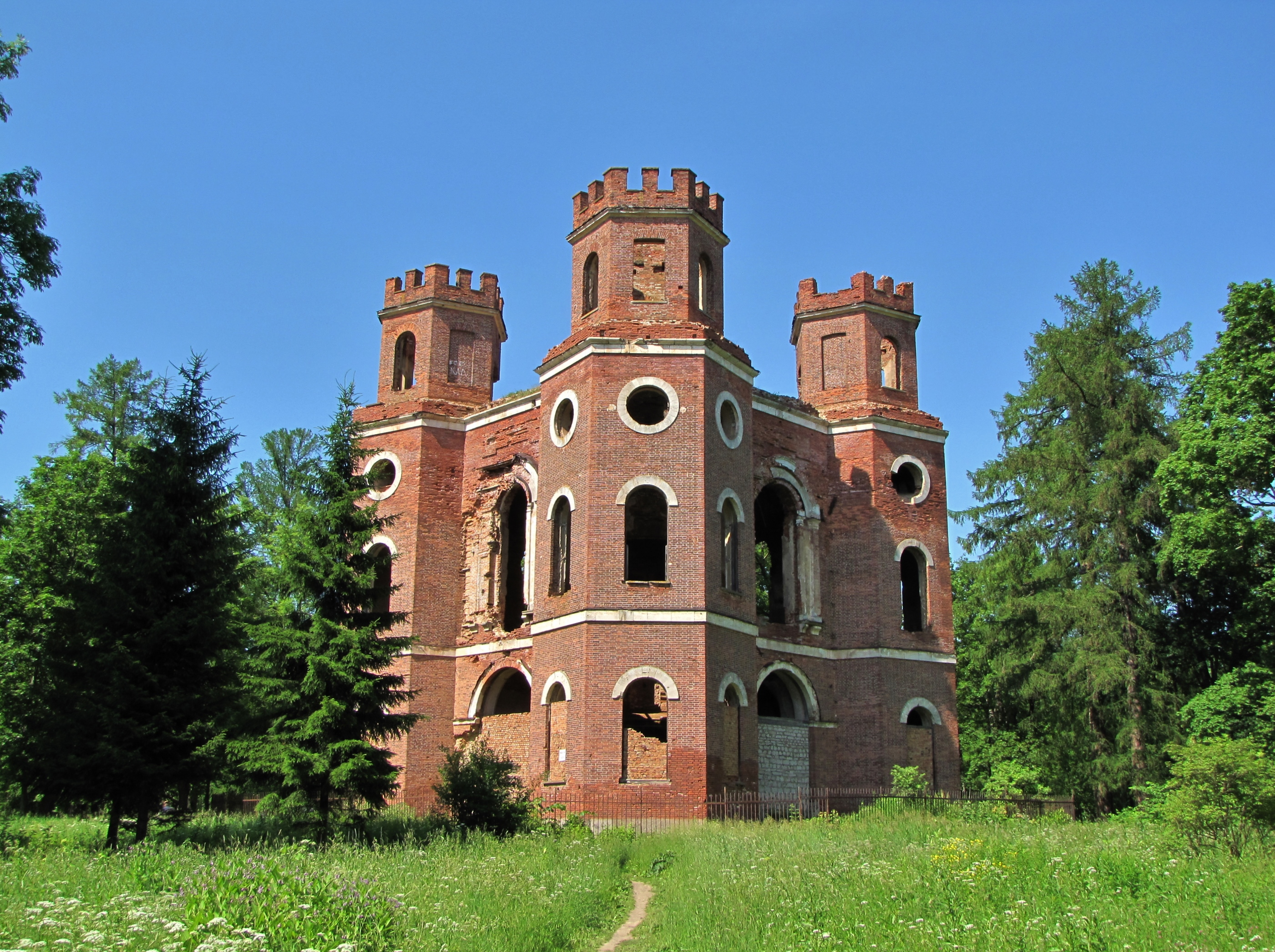 Павильон «Арсенал» («Монбижу») (Санкт-Петербург и Лен.область, Пушкин, пейзажная часть парка)